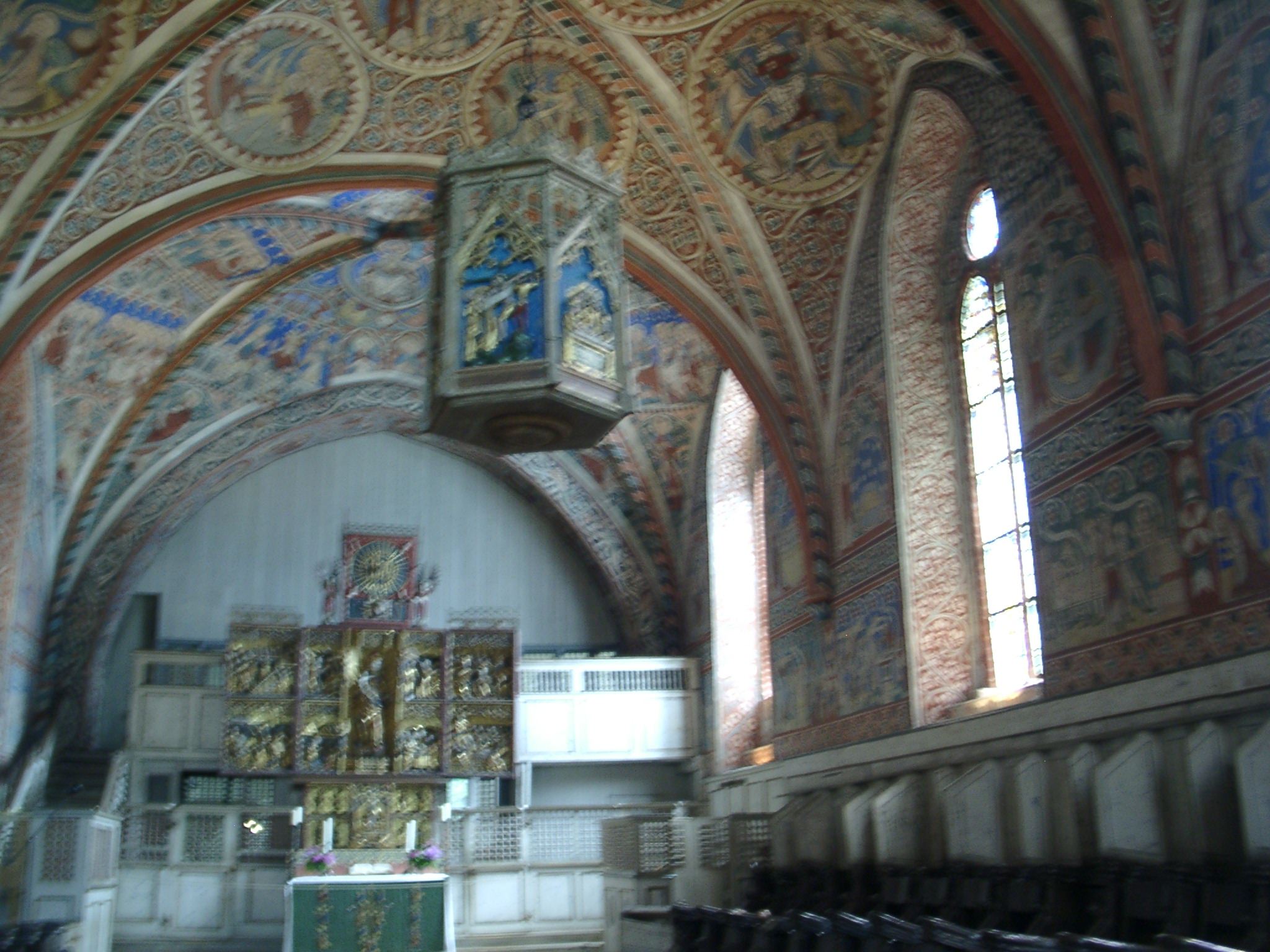 Wienhausen monastery